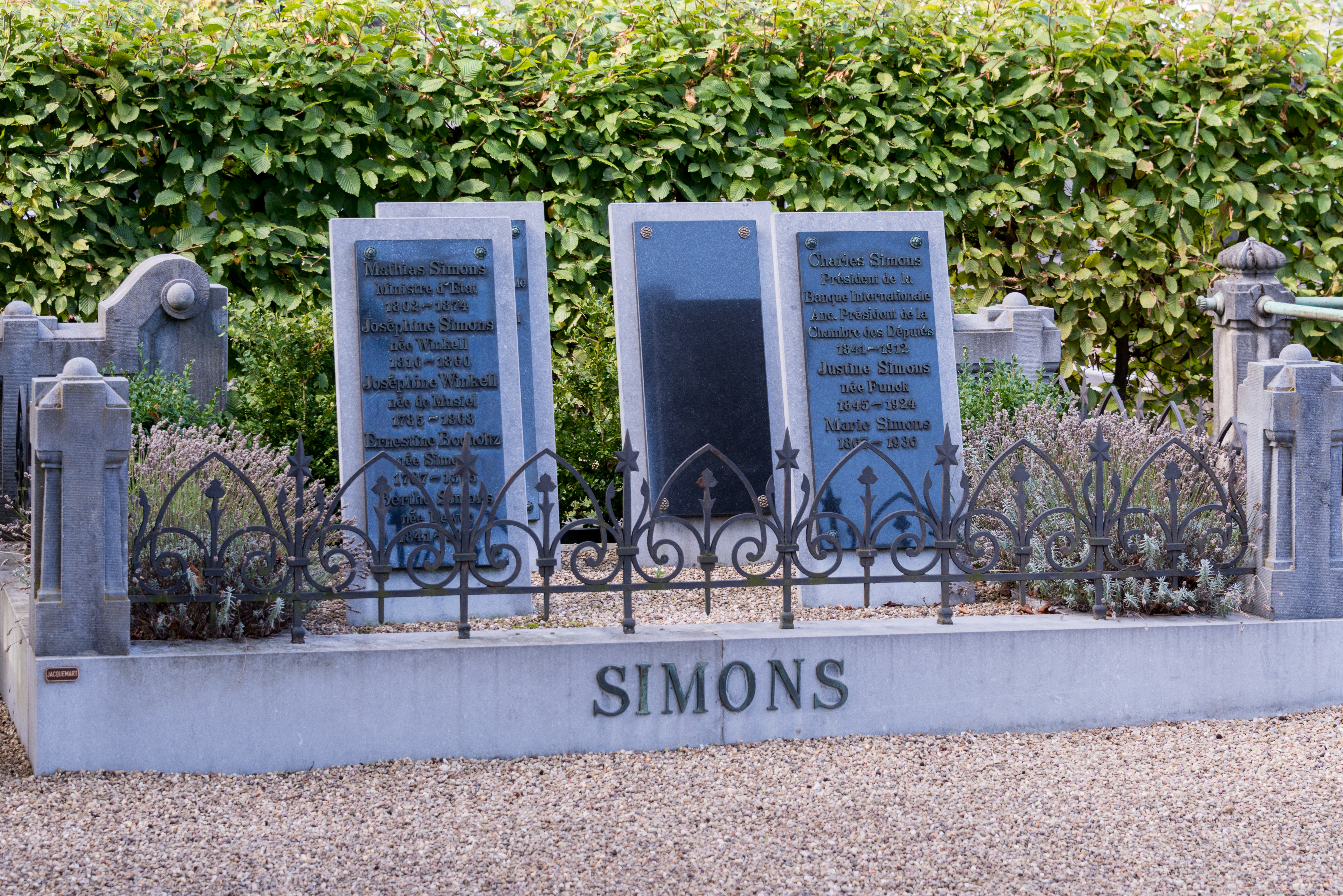 D'Familljegraf Simons um Nikloskierfecht. Hei sinn ë.a. de Charles-Mathias Simons an de Charles-Jean Simons begruewen.